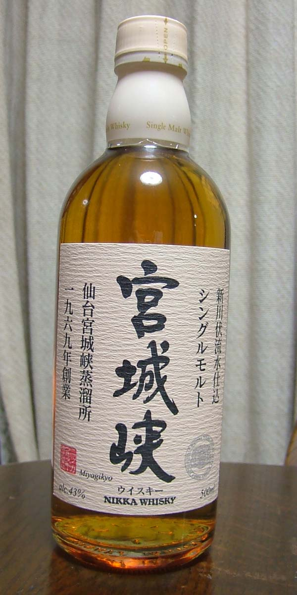 ニッカウヰスキー宮城峡